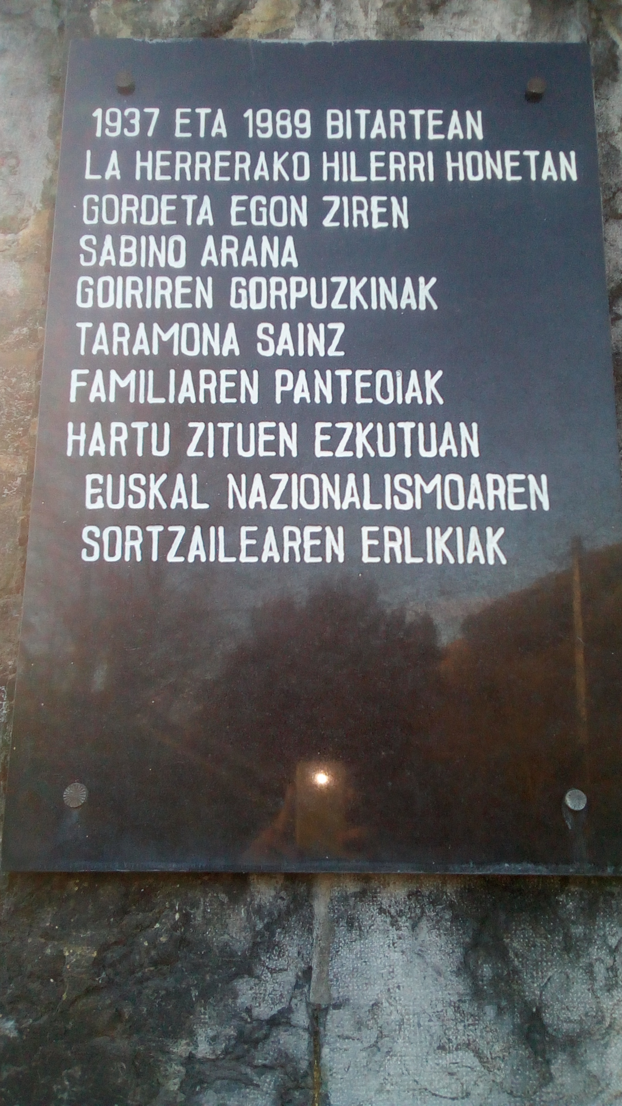 Franco diktadorea Sukarrietara heldu baino lehen, jeltzaleak frankistei zieten beldurraren ondorioz, Sabin Aranaren gorpuzkinak lurperatuta zegoen tokitik sekretupean atera eta Zallako La Herrerako hilerrian gorde zituzten.